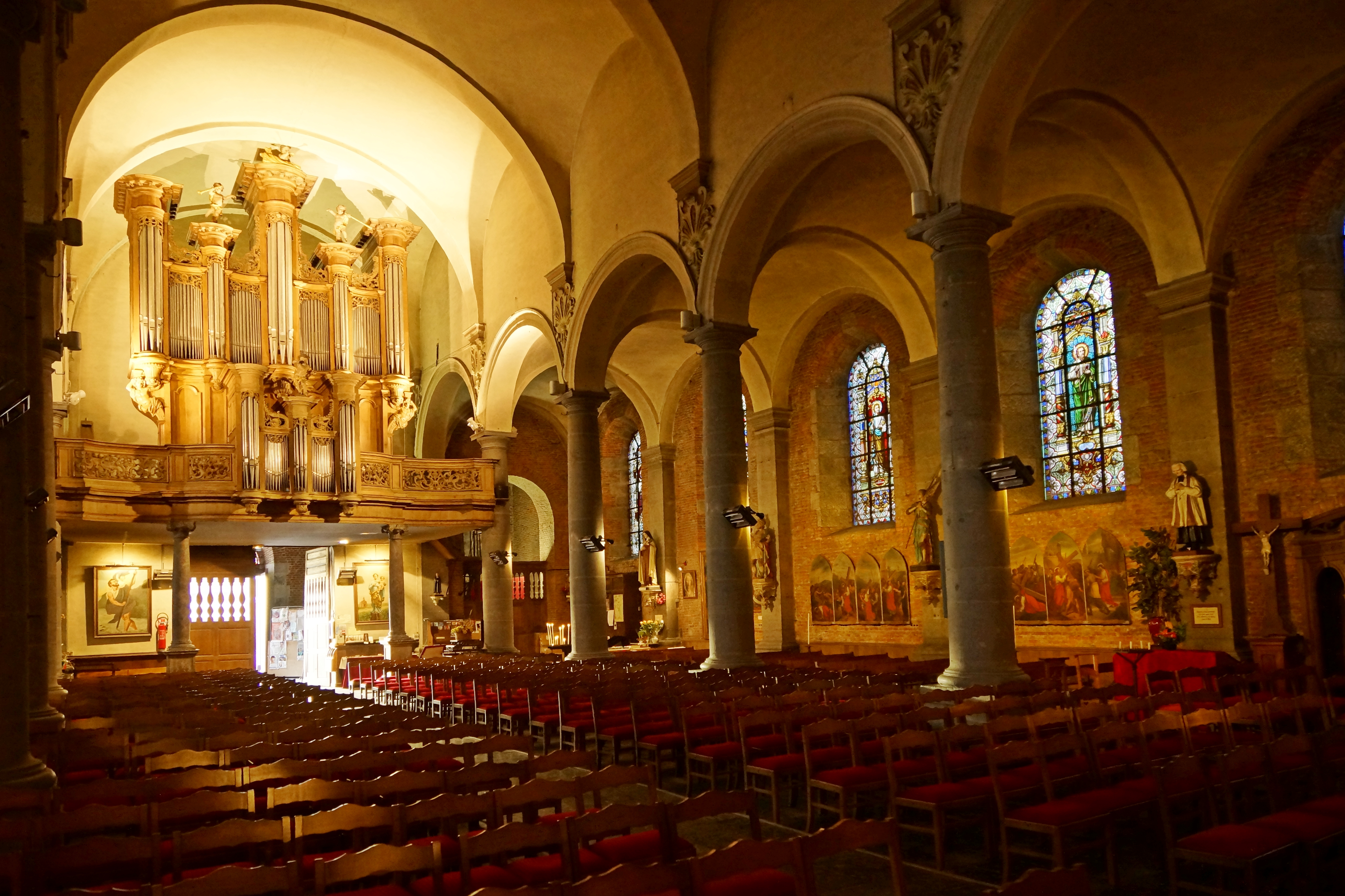 Intérieur Église Saint-Humbert de Maroilles .